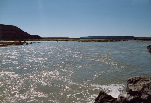 Vista del Rio Colorado desde el Hotel Rincon, Neuquén, Argentina.